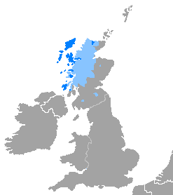 Idioma gaélico escocés